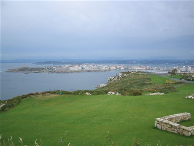 A Coruña desde San Pedro, Galiza'A Coruña desde San Pedro'